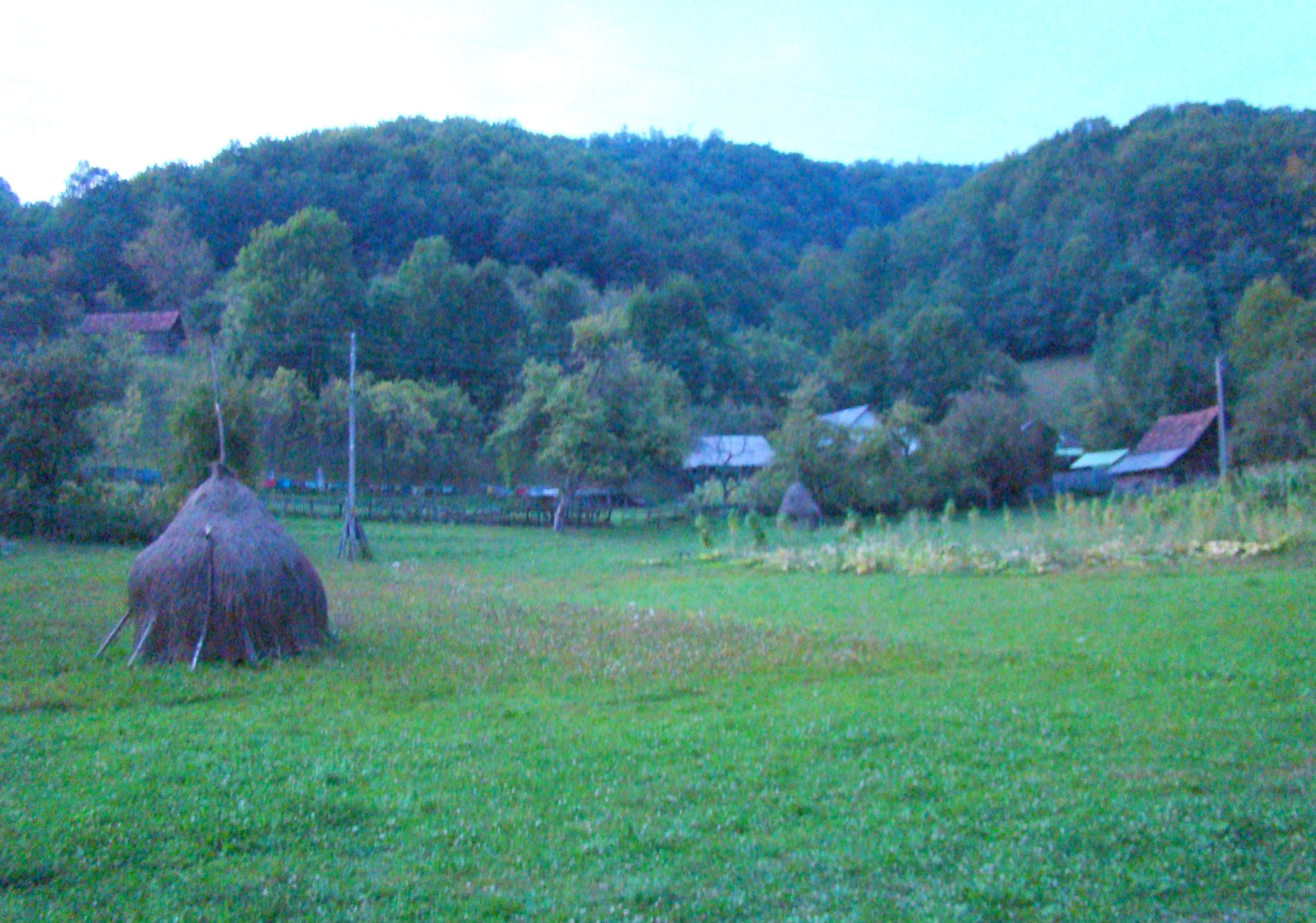 Biserica de lemn din Stănija-Hunedoara